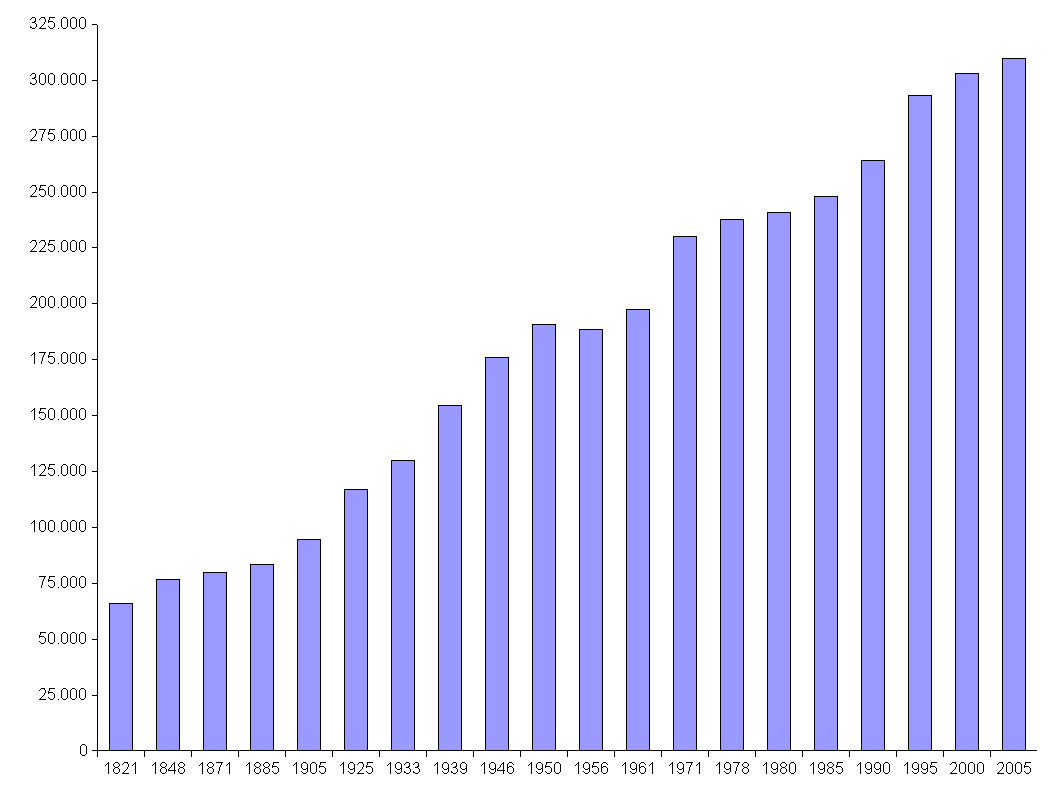 Einwohnerentwicklung im Landkreis Emsland zwischen 1821 und 2005